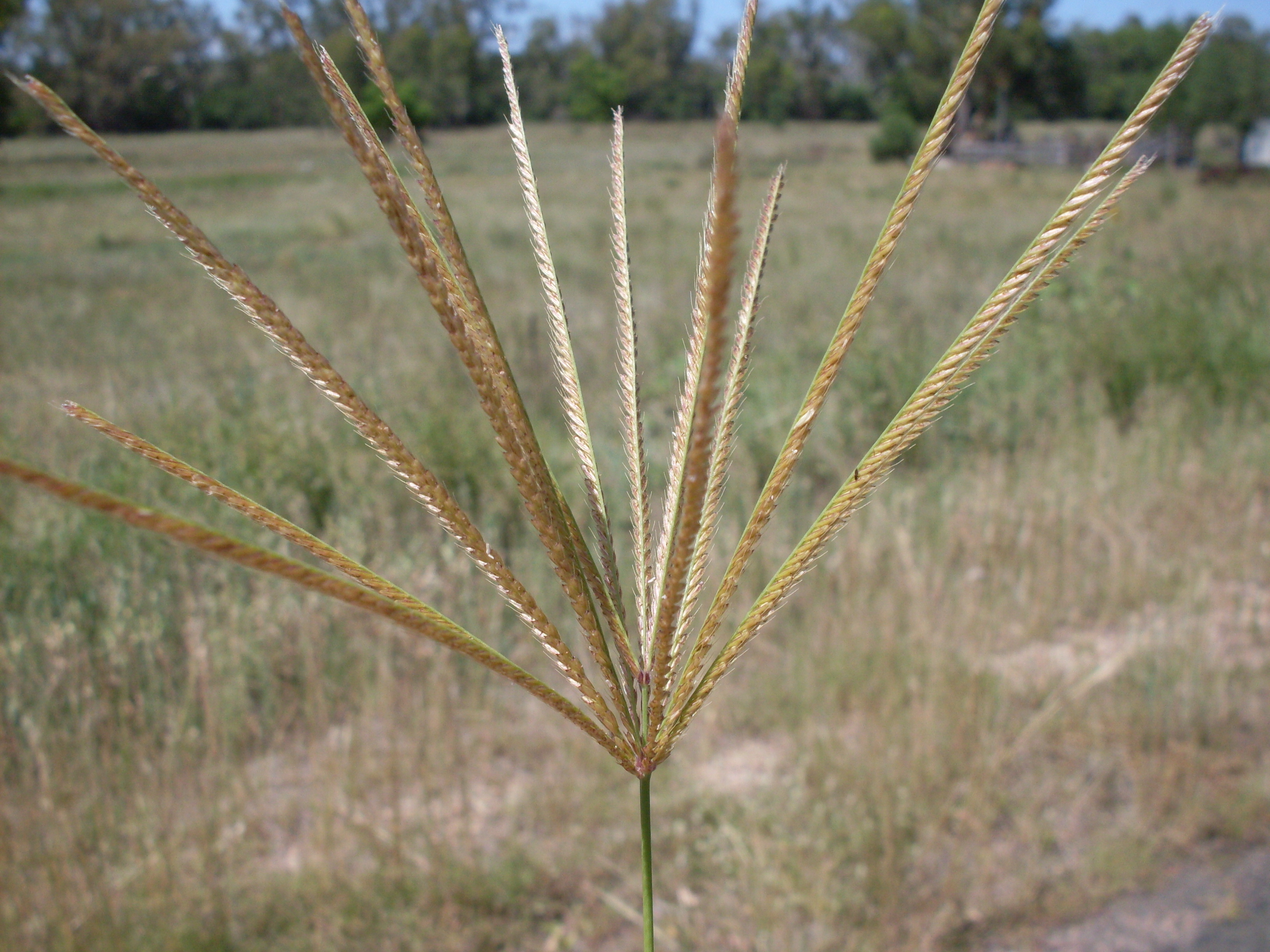 Rhodes grass, Chloris gayana. Mt Kaputar Rd, Narrabri, NSW Australia. January 2009.